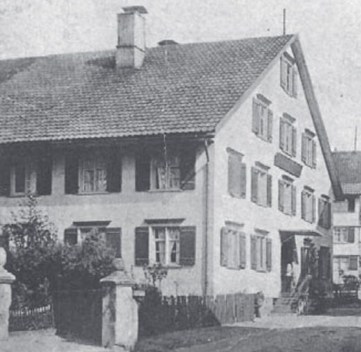 "Weinwirt ohne Schild" in Scheidegg um 1900, heute "Gasthaus zum Hirschen"